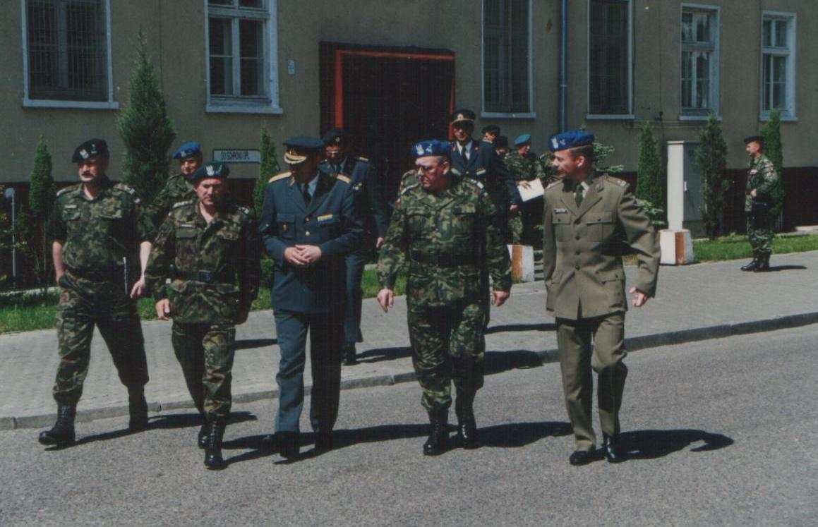 Dowódca garnizonu Stargard Szczeciński ppłk Marian Kołaciński